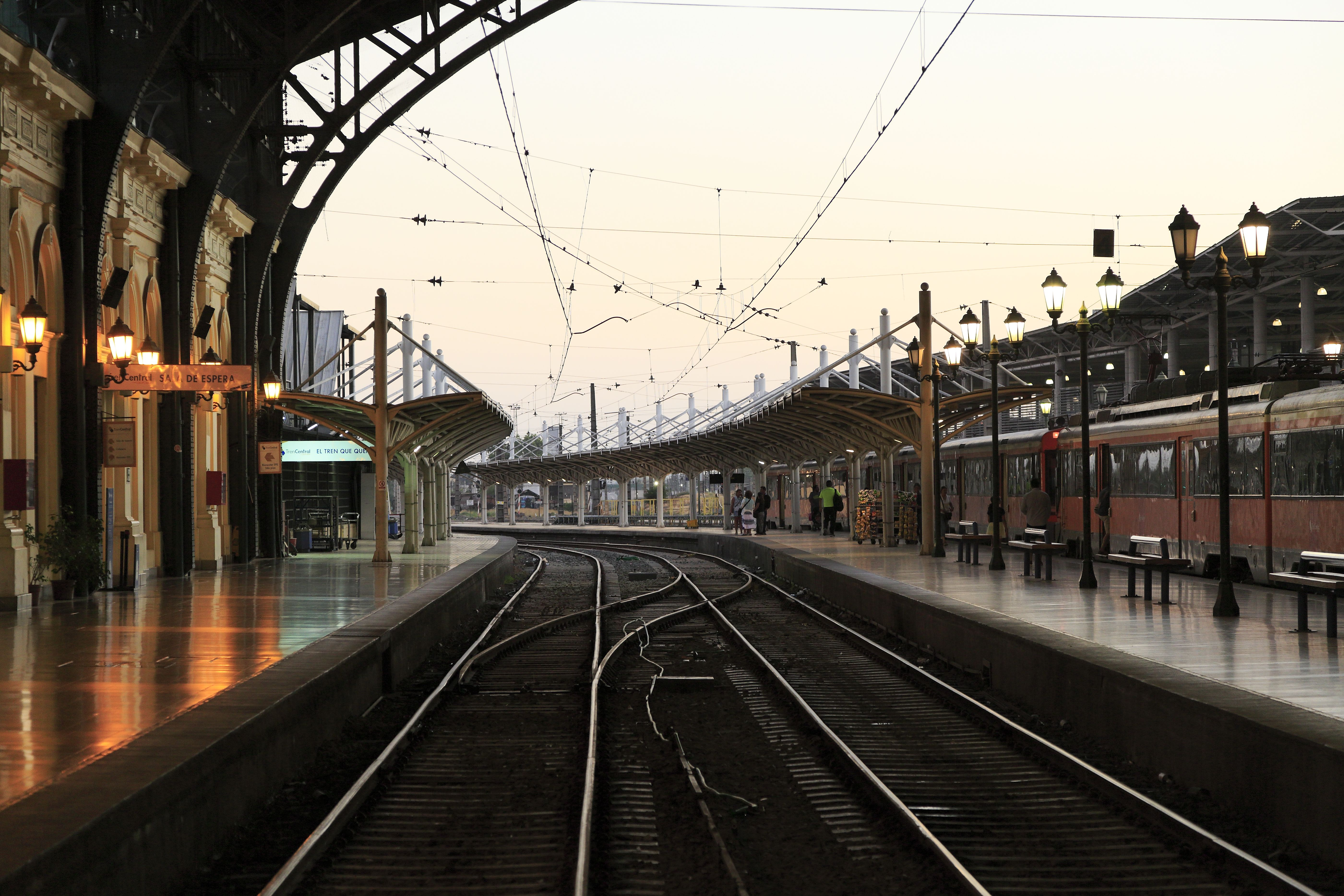 Beide Gleise wären für den Fernverkehr in Richtung Puerto Montt bestimmt, allerdings verkehrt derzeit nur ein Zugpaar pro Tag von und nach Chillán. Lokbespannte Wagenzüge sind kaum darunter, entsprechend selten werden die beiden Weichen bewegt.Ein Jahr danach im Februar 2017 sind die Weichen ausgebaut, der rechte Bahnsteig ist für einen stufenlosen Einstieg in die Triebwagen der Reihe X’Trapolis Modular provisorisch erhöht.